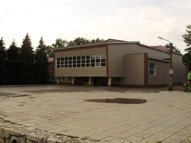 Шацкий районный дом культуры